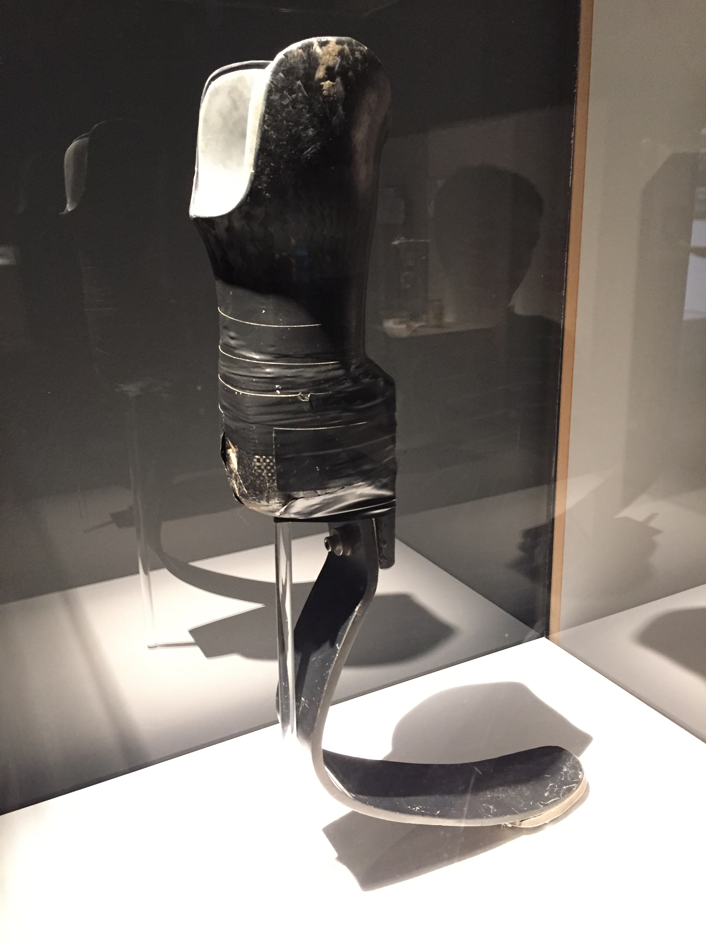 +Humans, exposició que va tenir lloc la tardor de 2015 al Centre de Cultura Contemporània de Barcelona